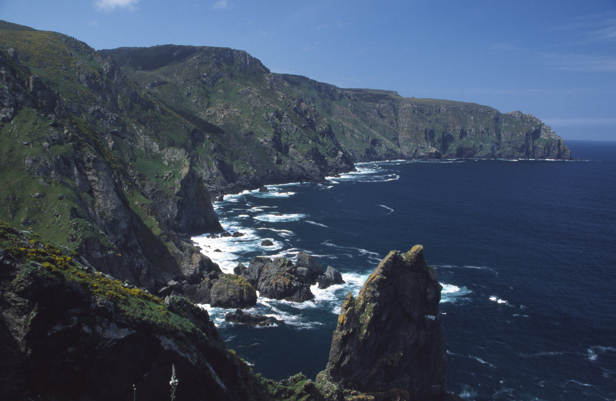 Cabo Ortegal - Cariño - A Coruña Maio 2000Cabo Ortegal